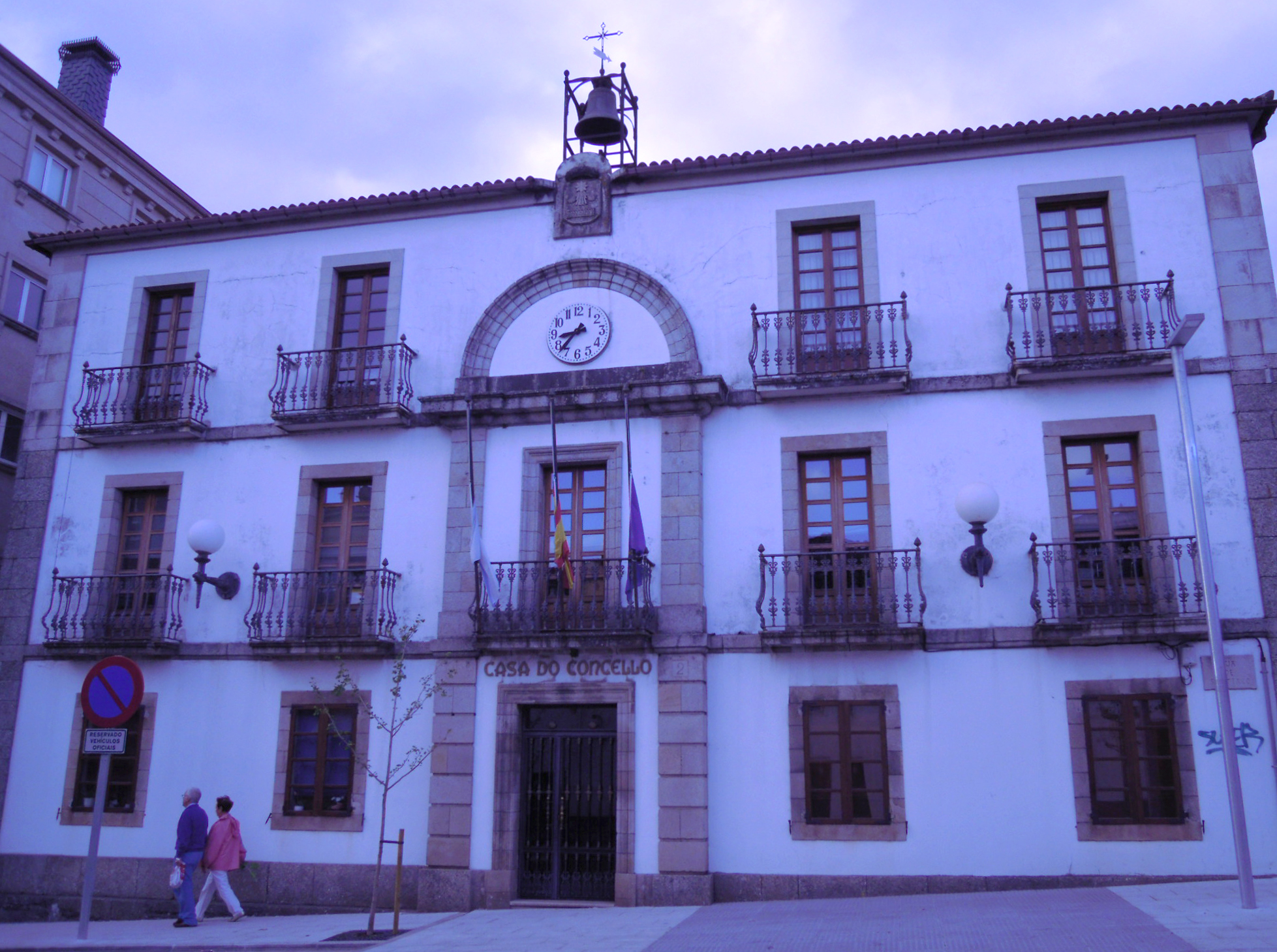 Casa consistorial de Arzúa